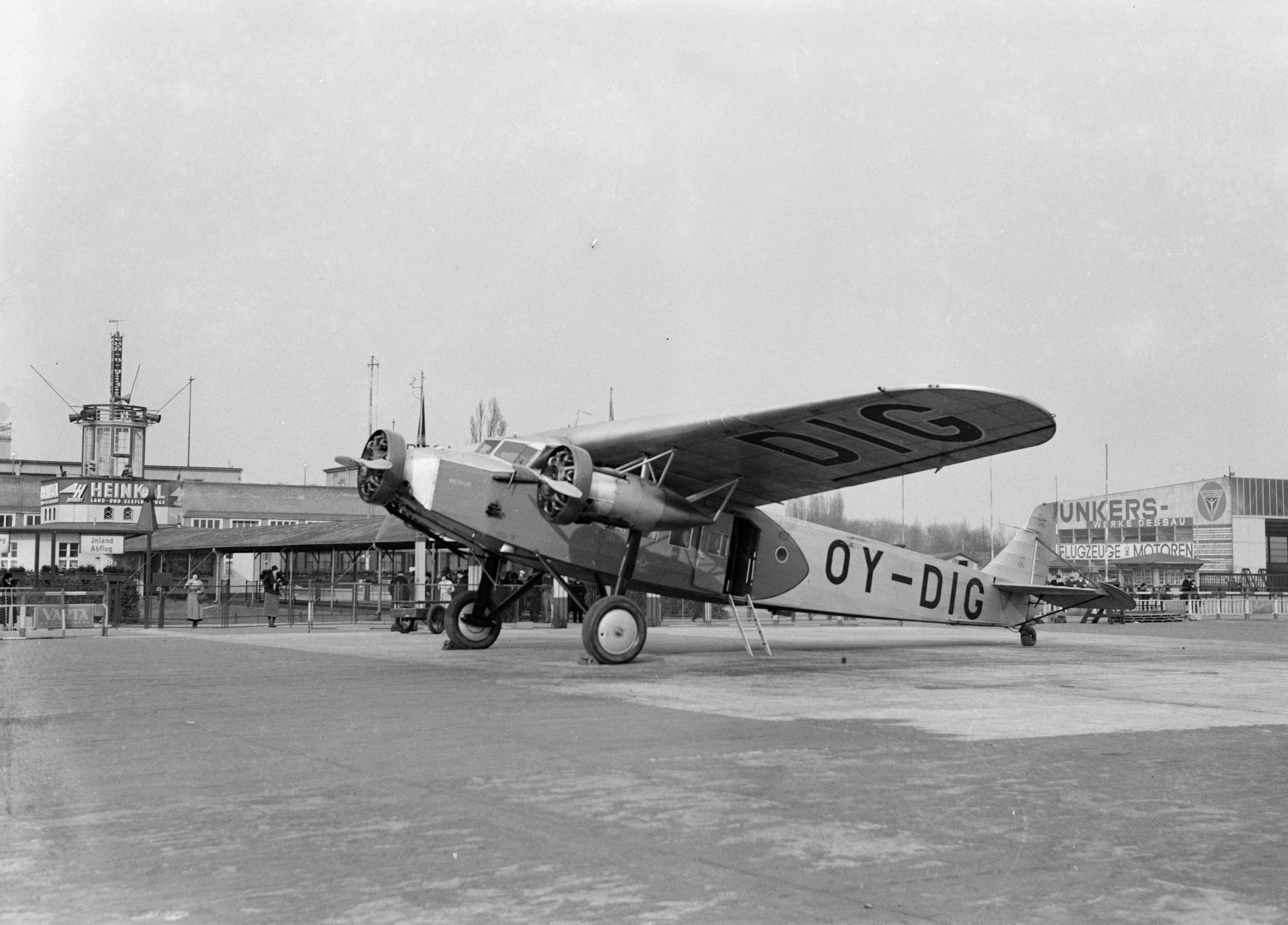 Collectie / Archief : Fotocollectie Van de Poll Reportage / Serie : Vliegveld Berlijn - Tempelhof Beschrijving : Fokker F.XII OY-DIG "Merkur" op het vliegveld Annotatie : De "Merkur" was vanaf 11 mei 1933 in gebruik bij de Deense vliegtuigmaatschappij Det Danske Luftfartsselskab A/S Datum : oktober 1934 Locatie : Berlijn, Duitsland Trefwoorden : luchtvaart, luchtvaartmaatschappijen, vliegtuigen, vliegvelden Instellingsnaam : Berlin-Tempelhof Fotograaf : Poll, Willem van de, [onbekend] Auteursrechthebbende : Nationaal Archief Materiaalsoort : Glasnegatief Nummer archiefinventaris : bekijk toegang 2.24.14.02 Bestanddeelnummer : 189-1379 Reacties Geplaatst door Anoniem op 10 december 2013 - 16:50. Dit is niet een Fokker F.VII (zoals in de beschrijving staat). De voorruit van de cockpit sluit bij de F.VII aan op de vleugelvoorrand. Deze cockpit staat echter veel verder naar voren. Ik hou het op een Fokker F.XII. Geplaatst door Nationaal Archief op 11 december 2013 - 08:44. Is inderdaad een Fokker F XII. Is volgens deze bron in 1945 in Denemarken buiten gebruik gesteld, waarschijnlijk na een ongeval De beschrijving is aangepast